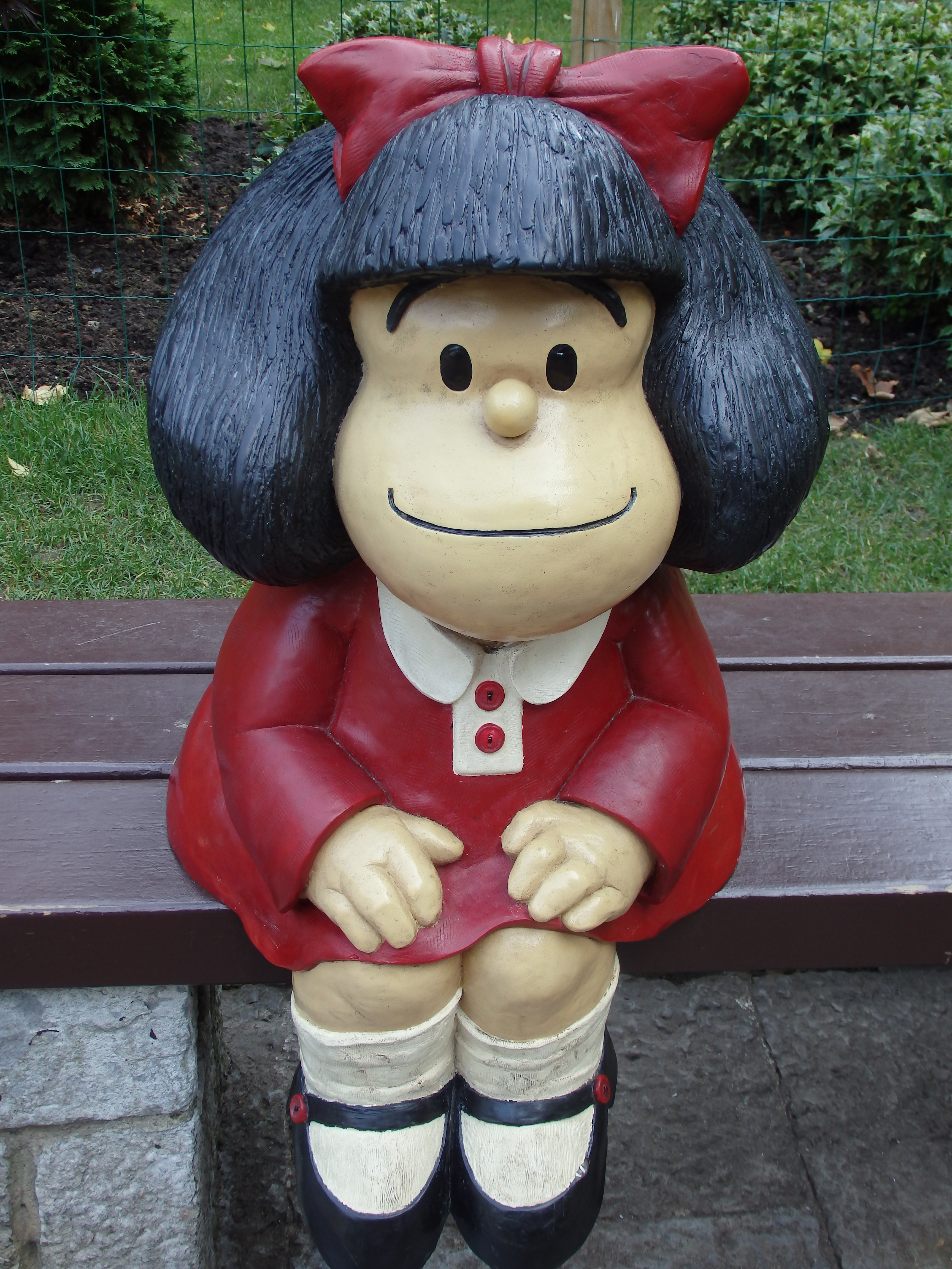 Mafalda en el campo San Francisco contemplando los cisnes y patos